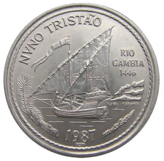 100escudos 1446-1987 NVNO TRISTAO Rio Gambia ==